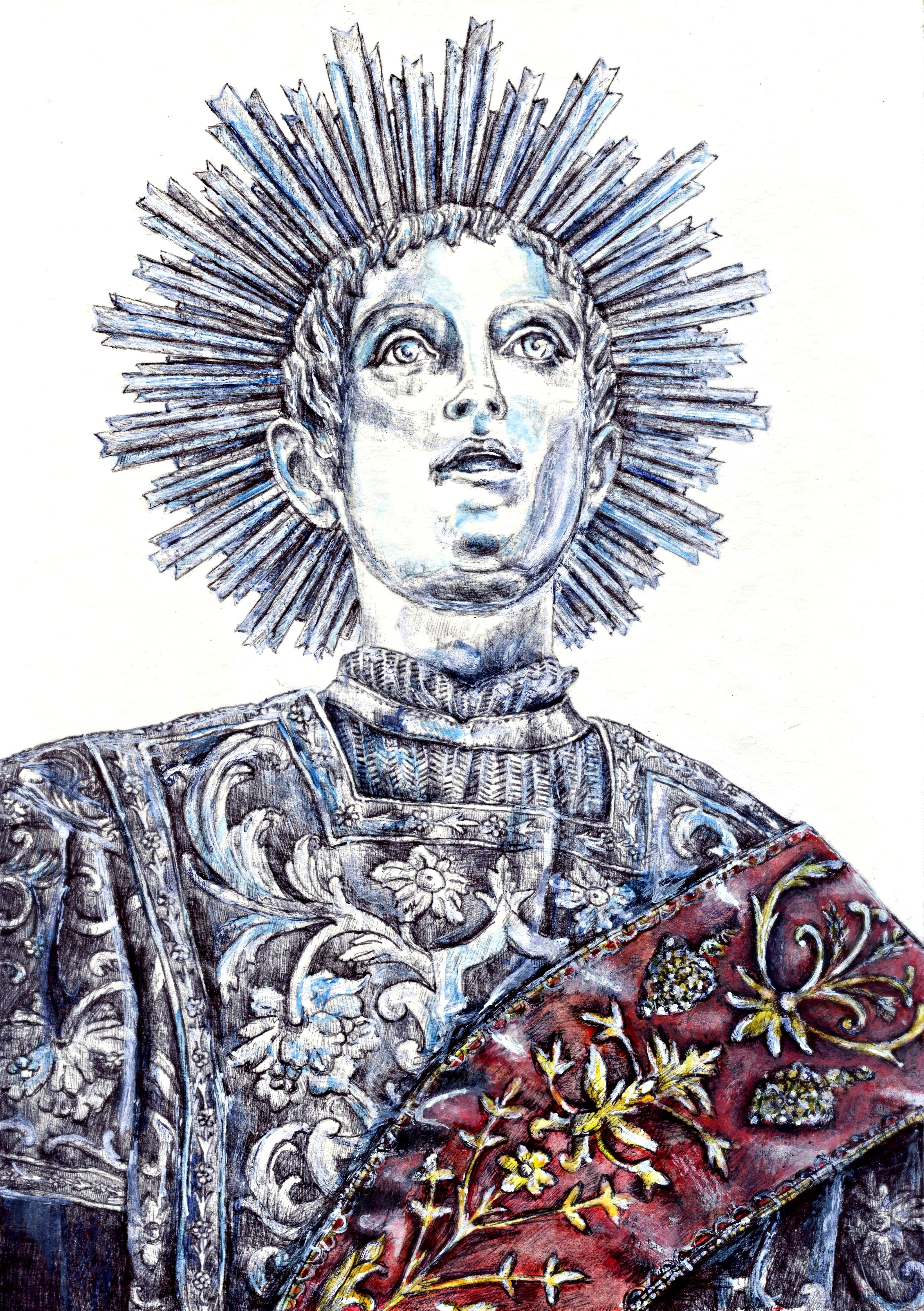 Illustrazione del busto argenteo di San Cesario diacono e martire, Cesa